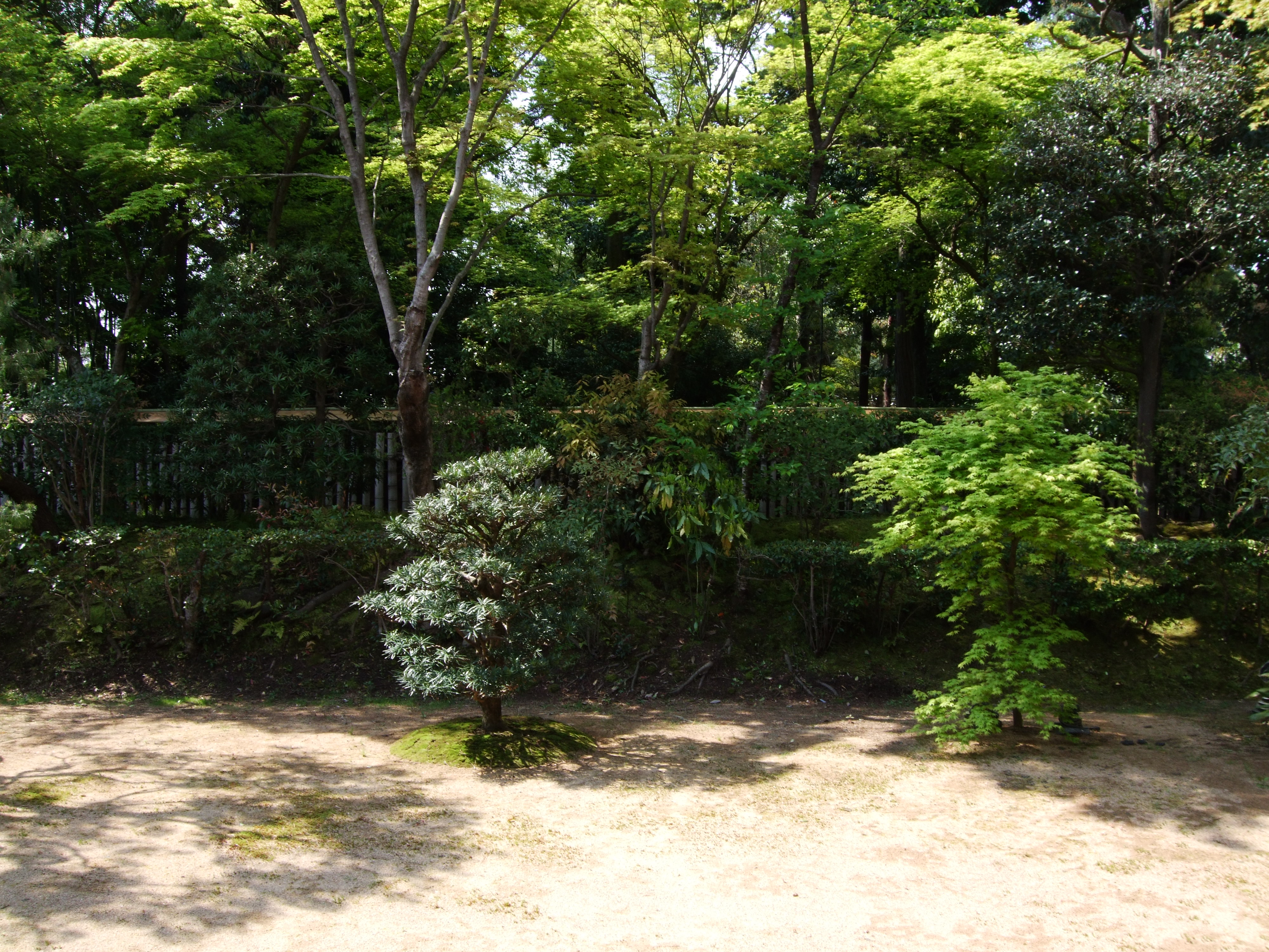 玉林院 本堂庭園